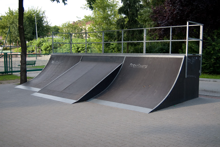 skatepark